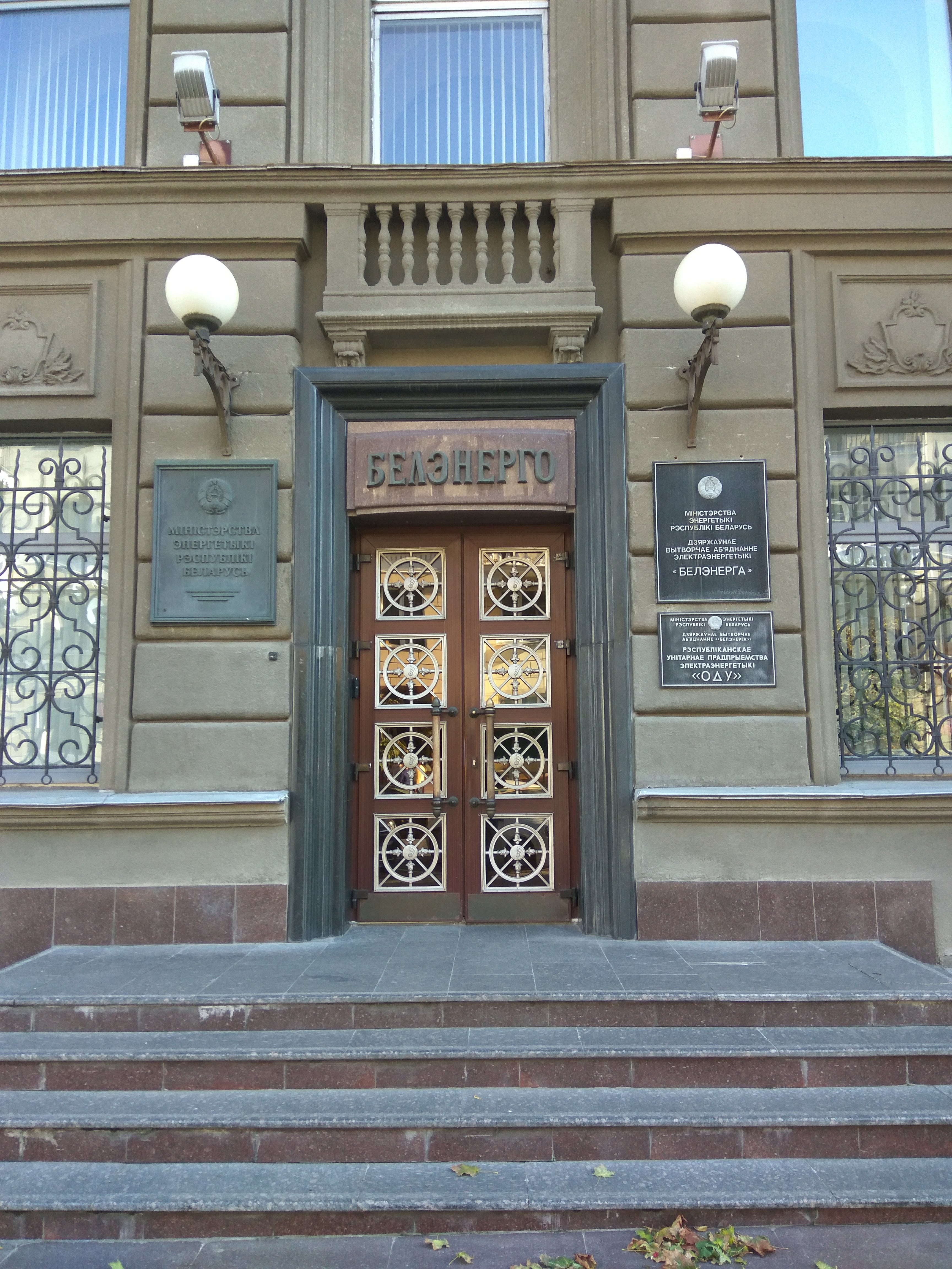 Мінск. Вуліца Карла Маркса (кастрычнік 2018)